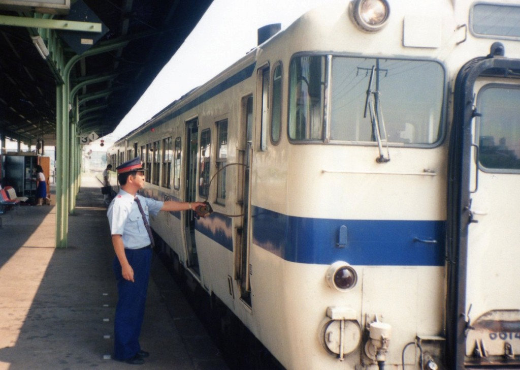 新飯塚駅でのタブレットの受け渡し